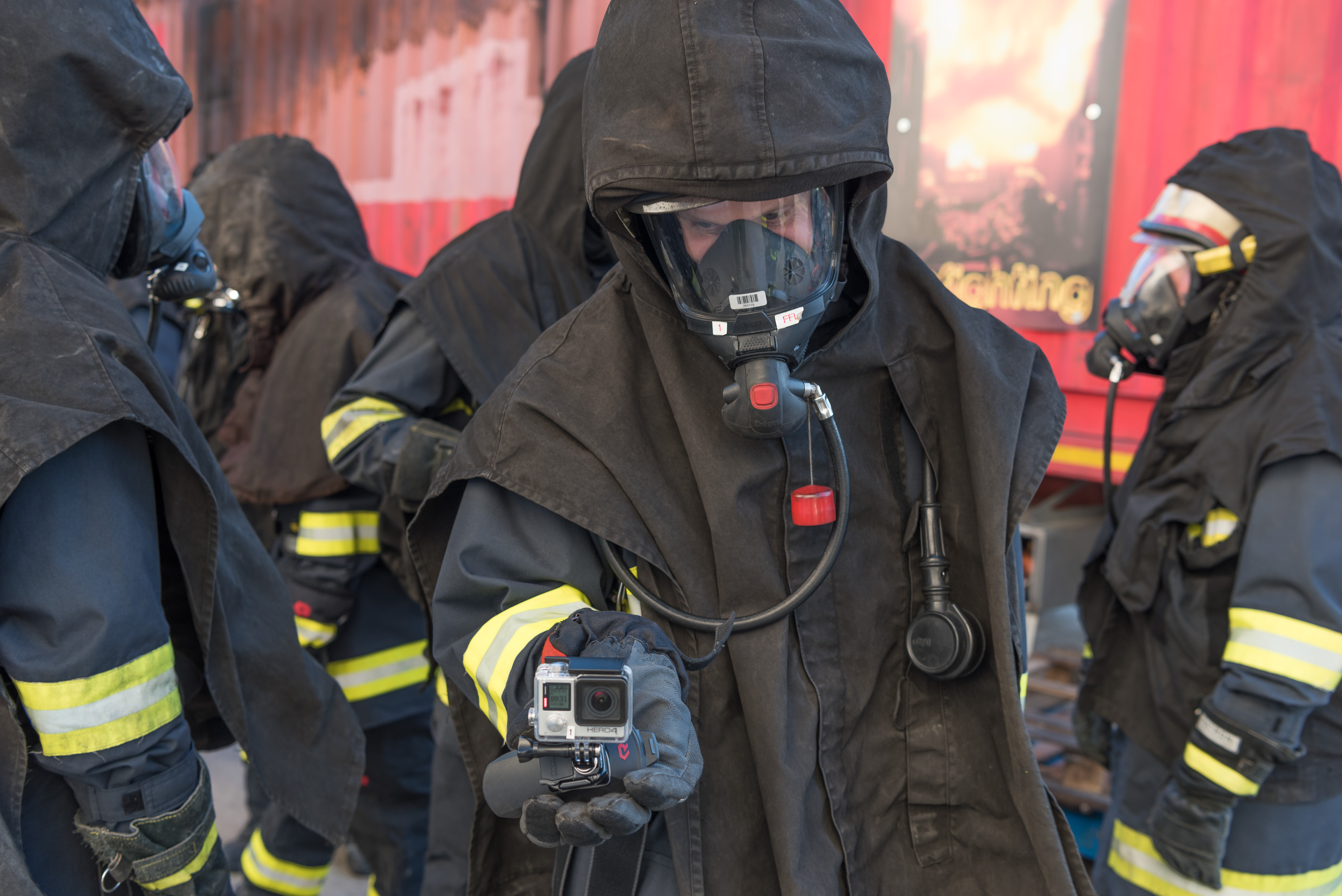 Eine Ausbildung für Atemschutzträger in einem Brandcontainer in Landshaag im oberösterreichischen Mühlviertel